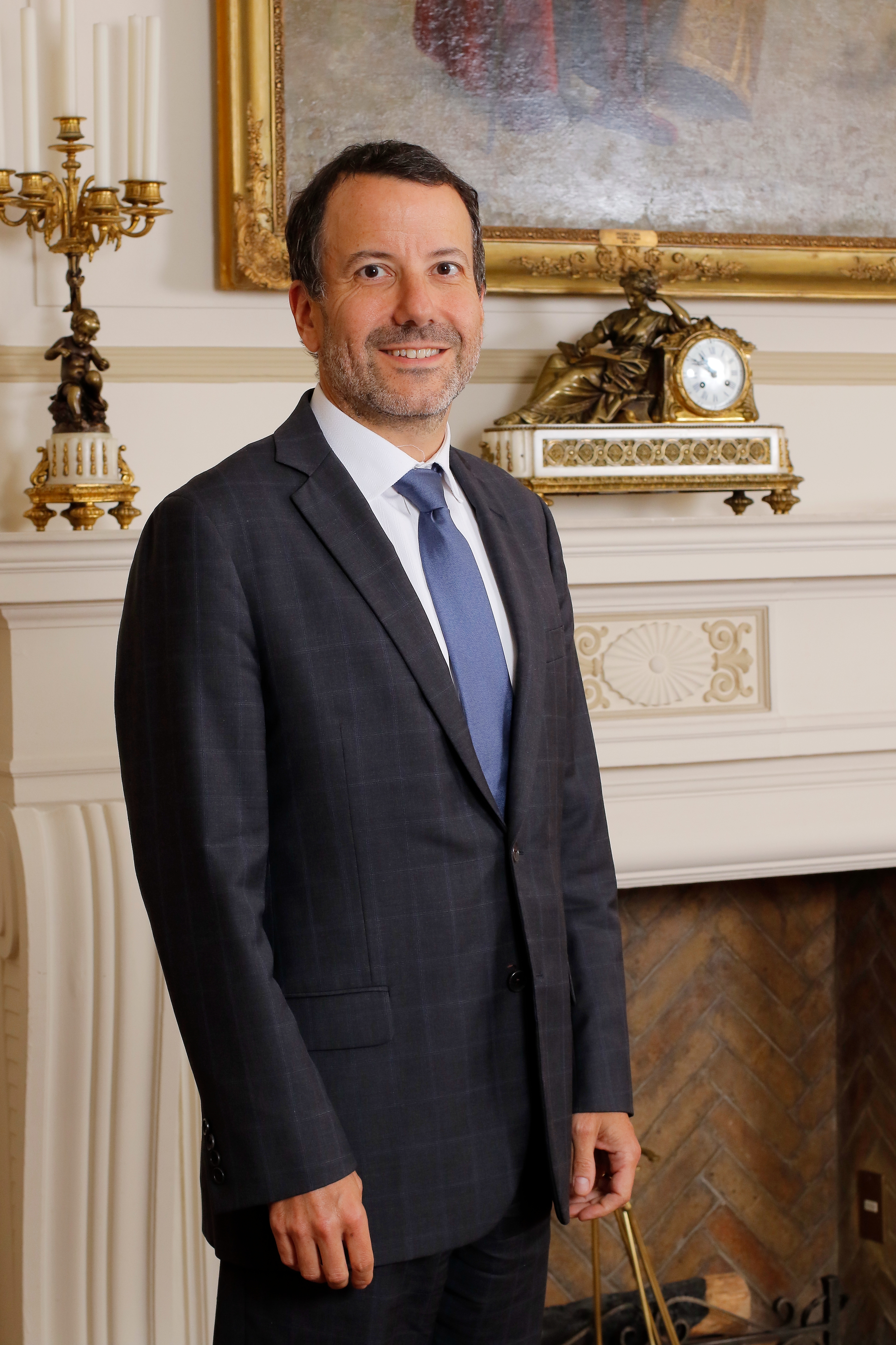 Pablo García es Consejero del Banco Central de Chile desde enero del 2014.